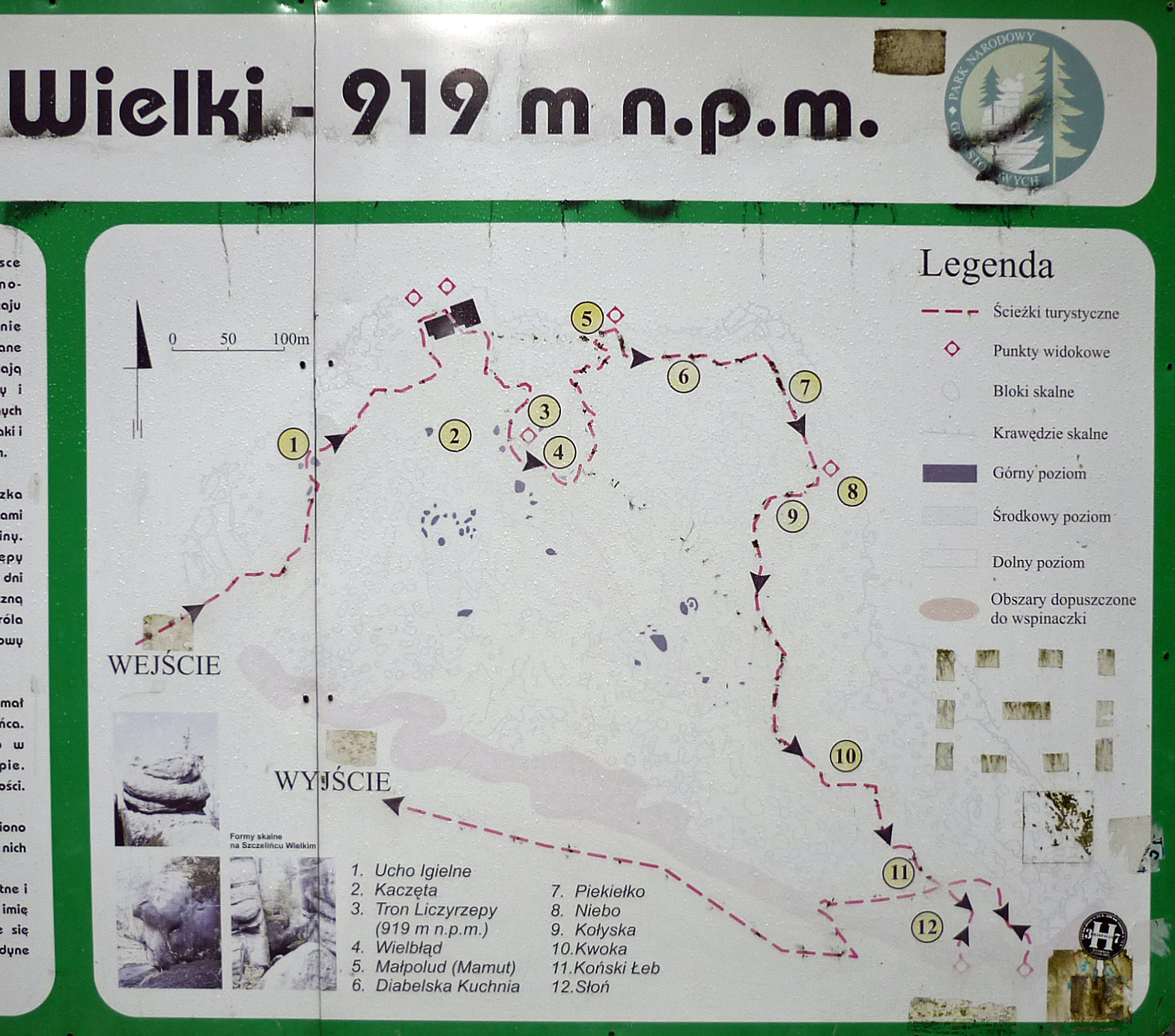 Felsformationen auf der Großen Heuscheuer (919 m, Szczeliniec Wielki) - Rundgang: 1-Nadelöhr, 2-Entenkücken, 3-Großvaterstuhl (919 m), 4-Kamel, 5-Mamut, 6-Teufelsküche, 7-Hölle, 8-Himmel. 9-Wiege, 10-Huhn, 11-Pferdekopf, 12-Elefant